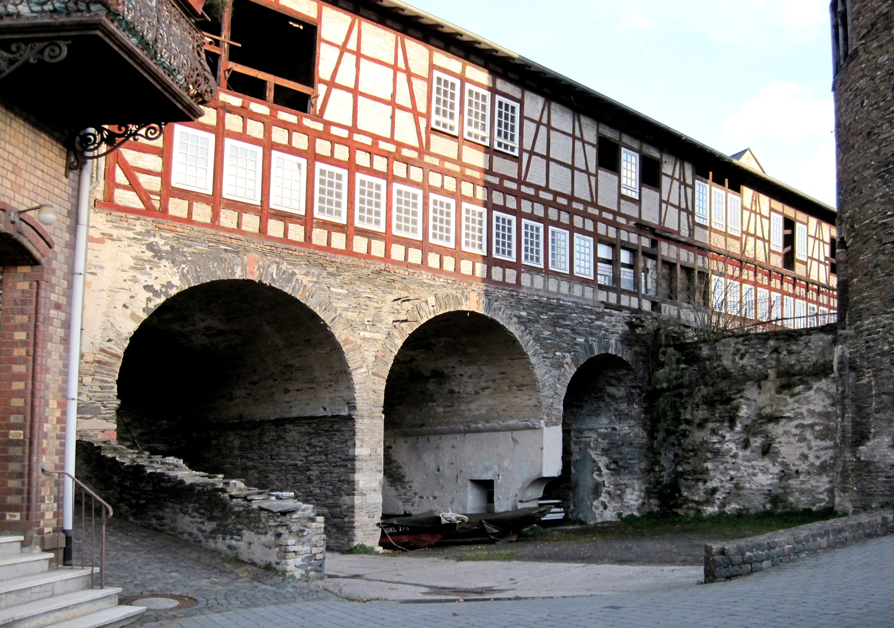 Spalthaus der Grube Wilhelm-Erbstollen in Kaub. Im Vordergrund die Grundmauern des alten Mahlwerkes. Rechts der Übergang zum mittelalterlichen Dicken Turm.